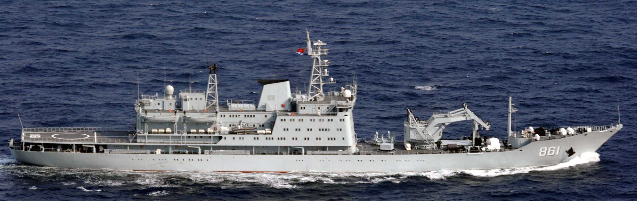 ３月２８日（月）午前４時半頃、第８護衛隊所属「すずつき」（佐世保）及び第１航空群所属「Ｐ－３Ｃ」（鹿屋）が、屋久島の西約１３０ｋｍの海域を東シナ海から太平洋に向けて北東進する中国海軍ジャンカイII級フリゲート１隻及びダージャン級潜水艦救難艦１隻の合計２隻を確認した。その後、当該艦艇が、大隅海峡を東航したことを確認した。